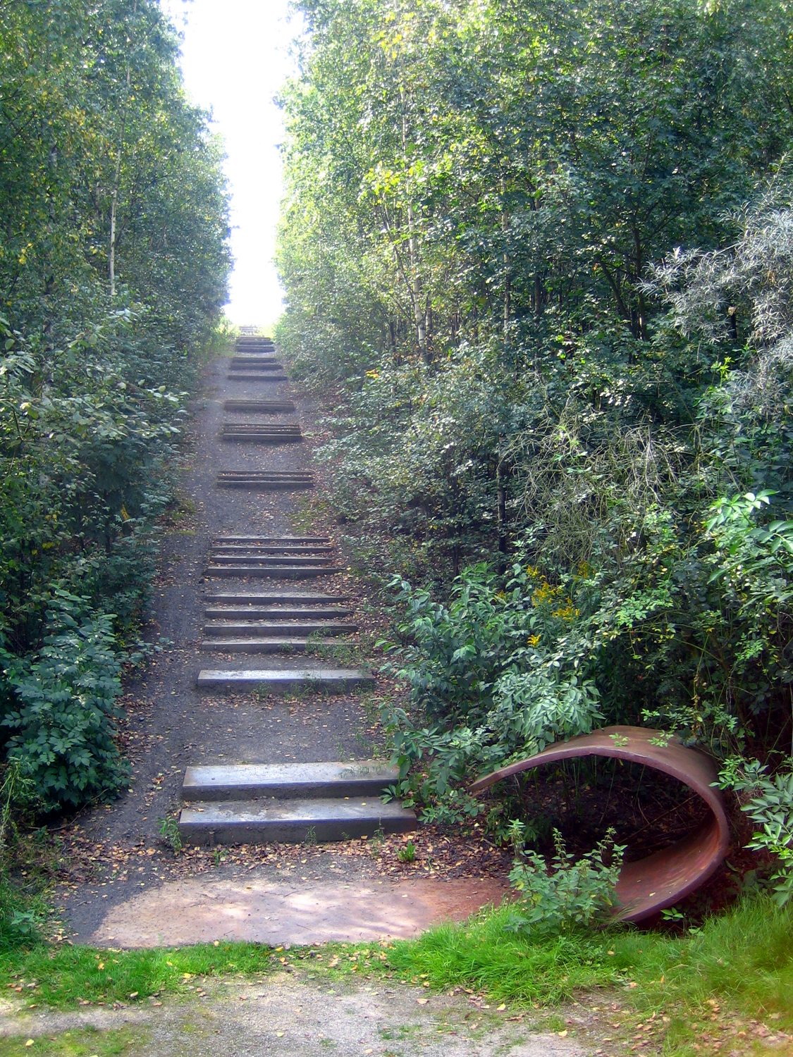 Osttreppe der Halde Schwerin zur Sonnenuhr in Castrop-Rauxel